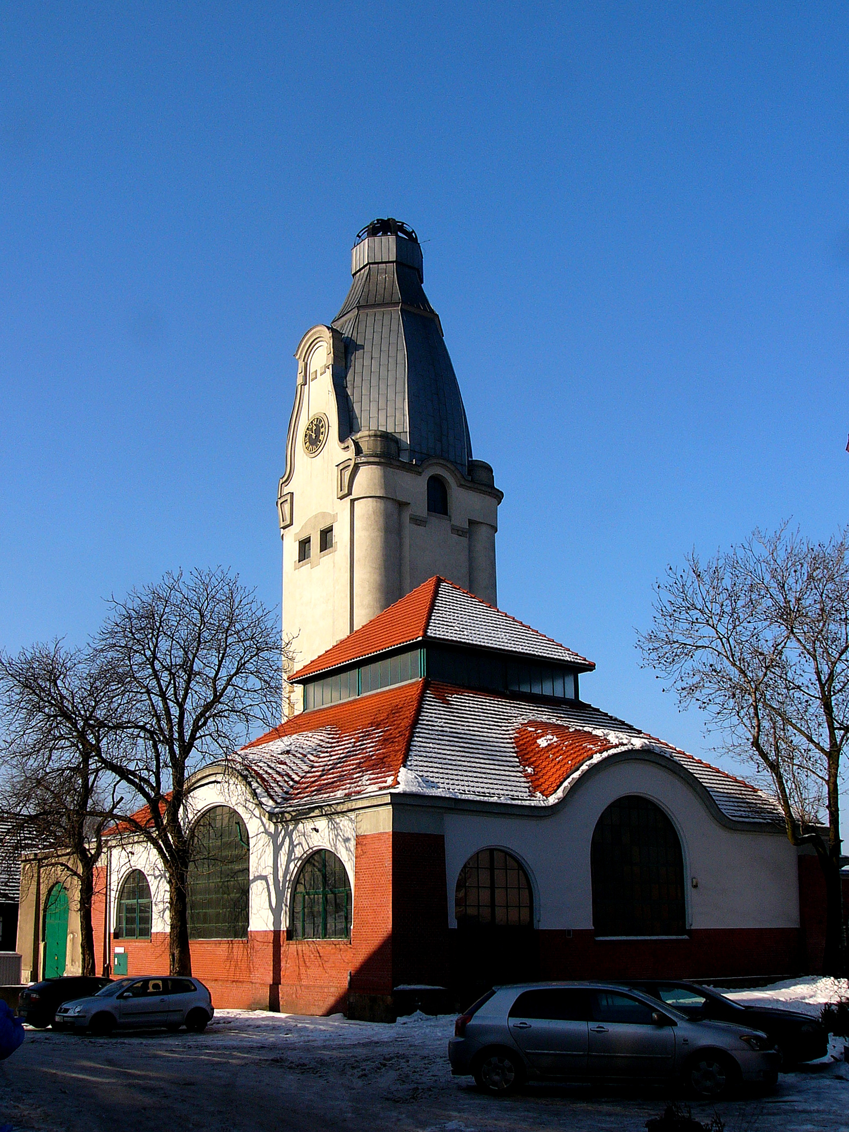 Chorzów, kotłownia, 1905-1906